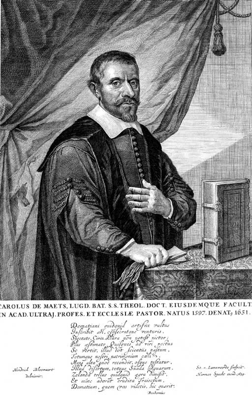 Carolus de Maets, 1597-1651, gravure